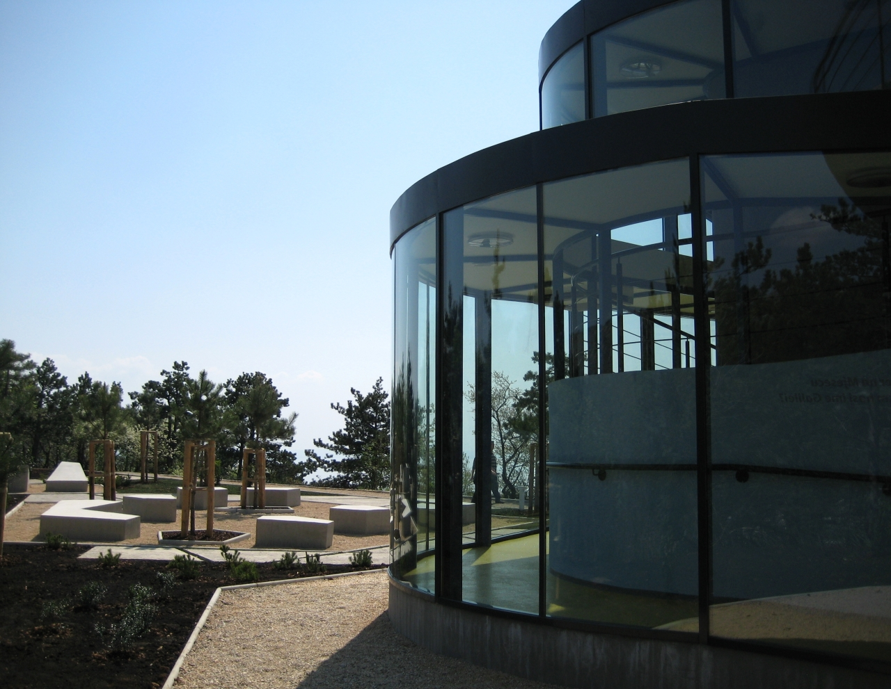 Astronomski centar u Rijeci na brdu Sveti Križ. Dana 18. svibnja 2001. godine članovi Akademskog astronomskog društva Rijeka, astronomi amateri i građani, dobili su Riječku zvjezdarnicu.